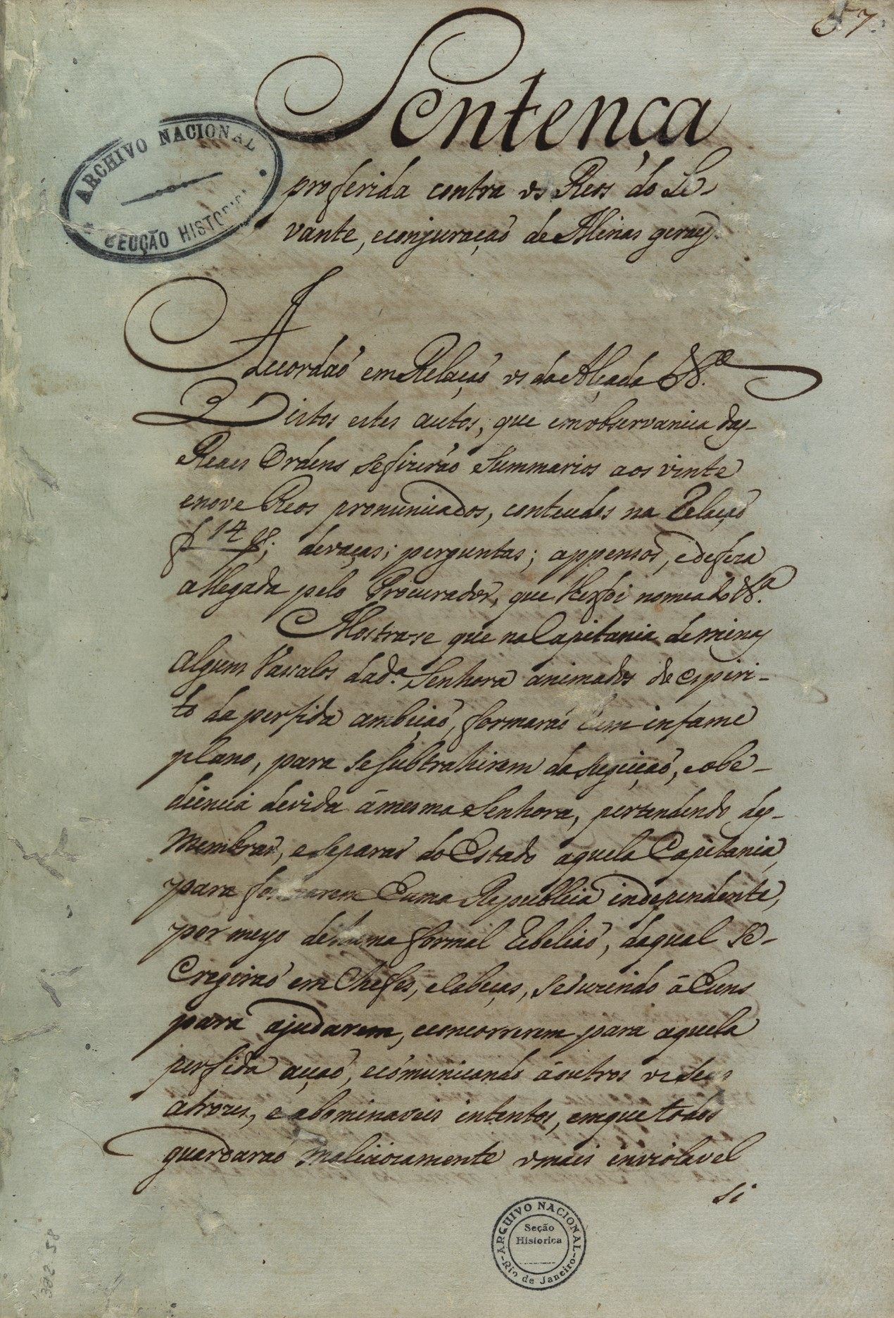 Sentença proferida contra os réus do levante e conjuração de Minas Gerais. Dentre os condenados, estava Joaquim José da Silva Xavier, o Tiradentes. Autos da Devassa da Conjuração Mineira.. Diversos Códices